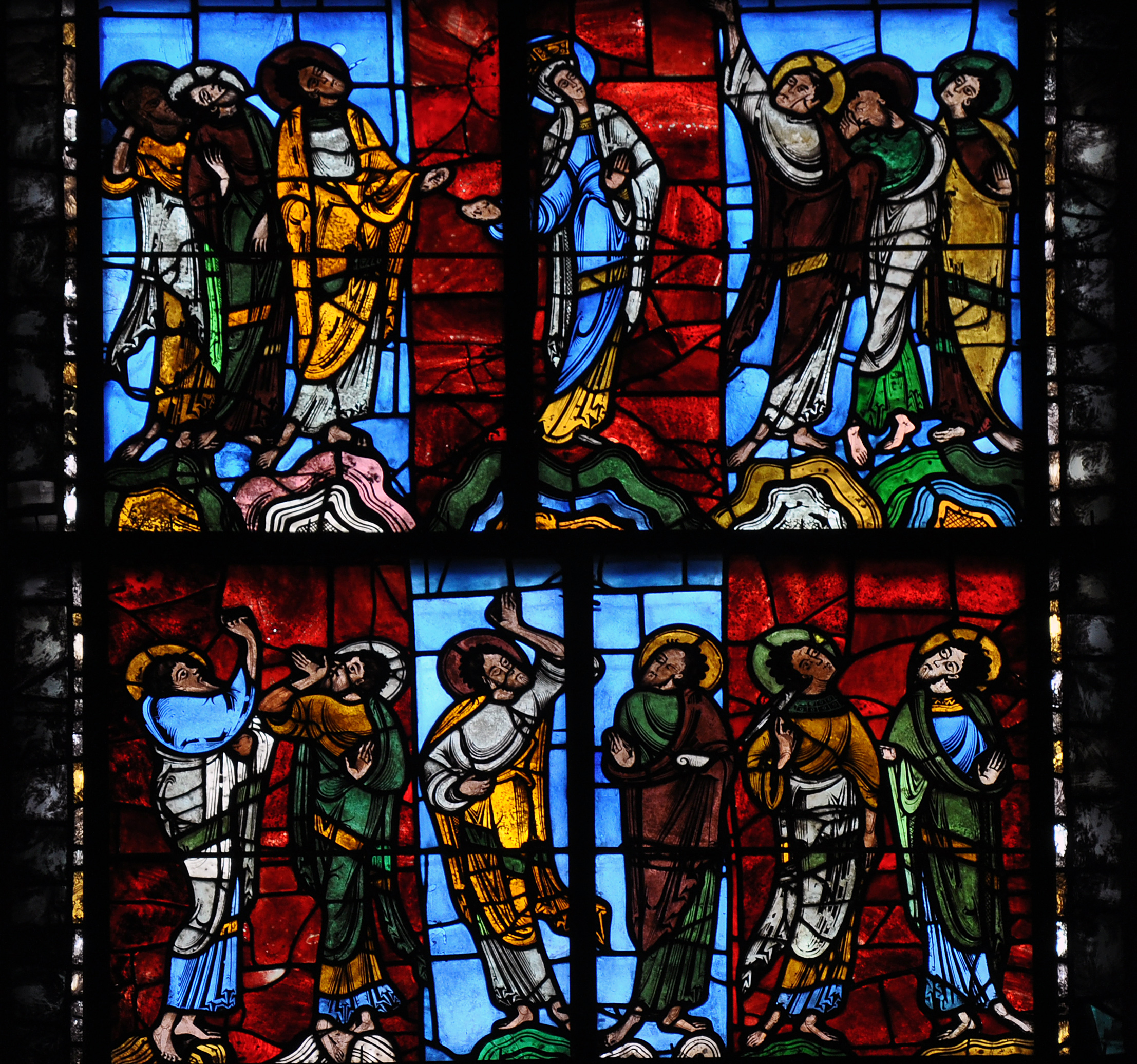 Cathédrale Saint-Julien du Mans. Vitrail de l'Ascension, fin 11ème - début 12ème siècle, le plus ancien vitrail sur site: la Vierge et les apôtres.